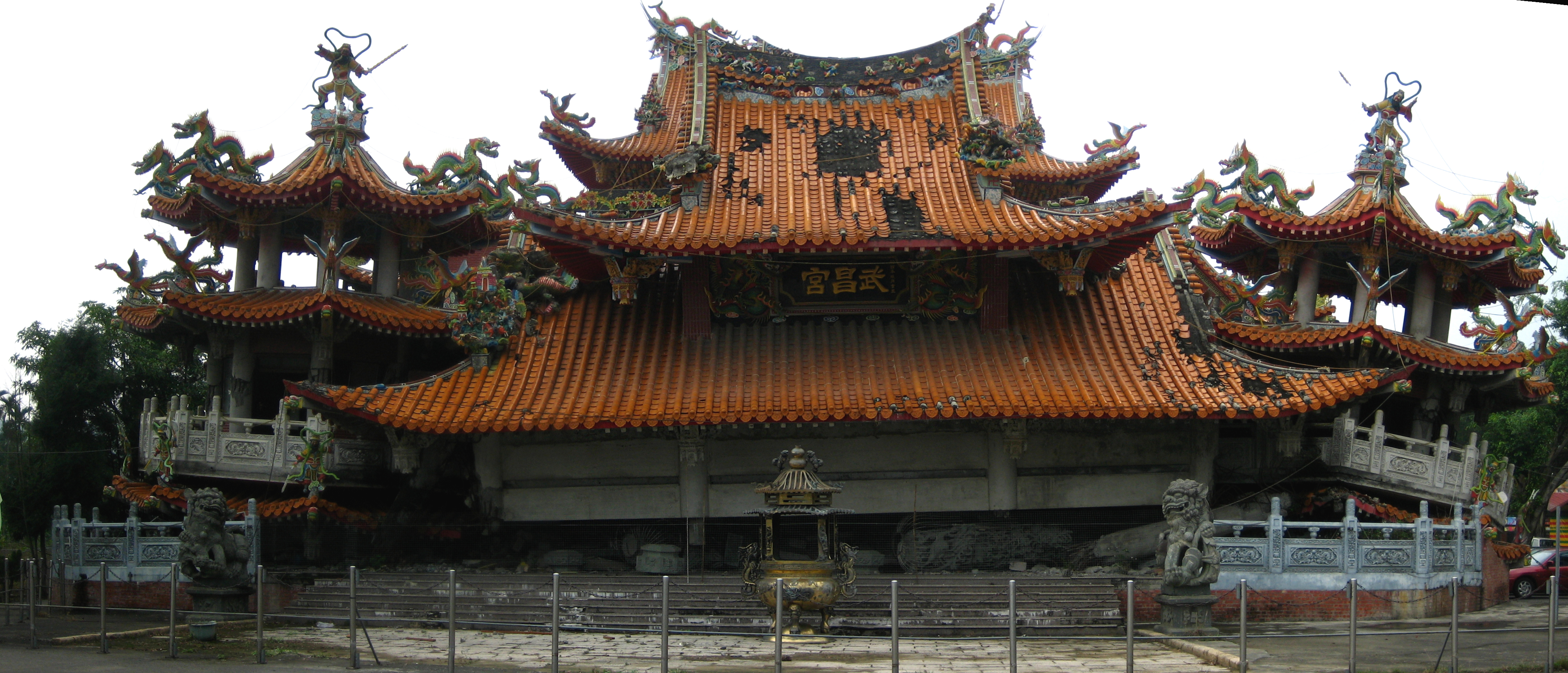 集集大地震後，棟折樑崩的集集武昌宮。Bân-lâm-gú: Tsi̍p-tsip Tuā-tē-tāng liáu-āu, niû-thiāu tó-khì ê Tsi̍p-tsi̍p Bú-tshiong-kiong. 集集大地動了後，樑柱倒去的集集武昌宮。